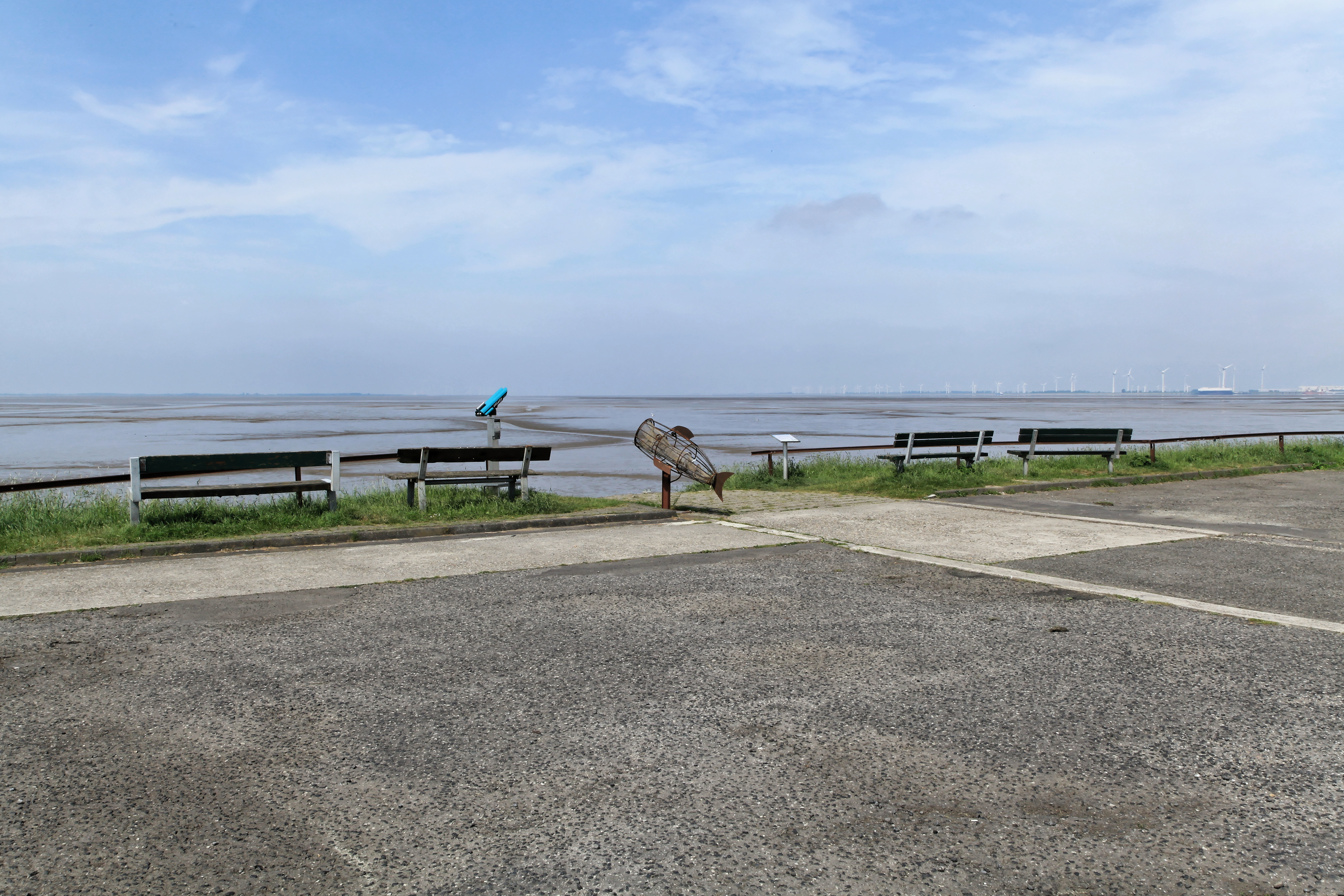 Bohrinsel Dyksterhusen, Wattweg in Jemgum